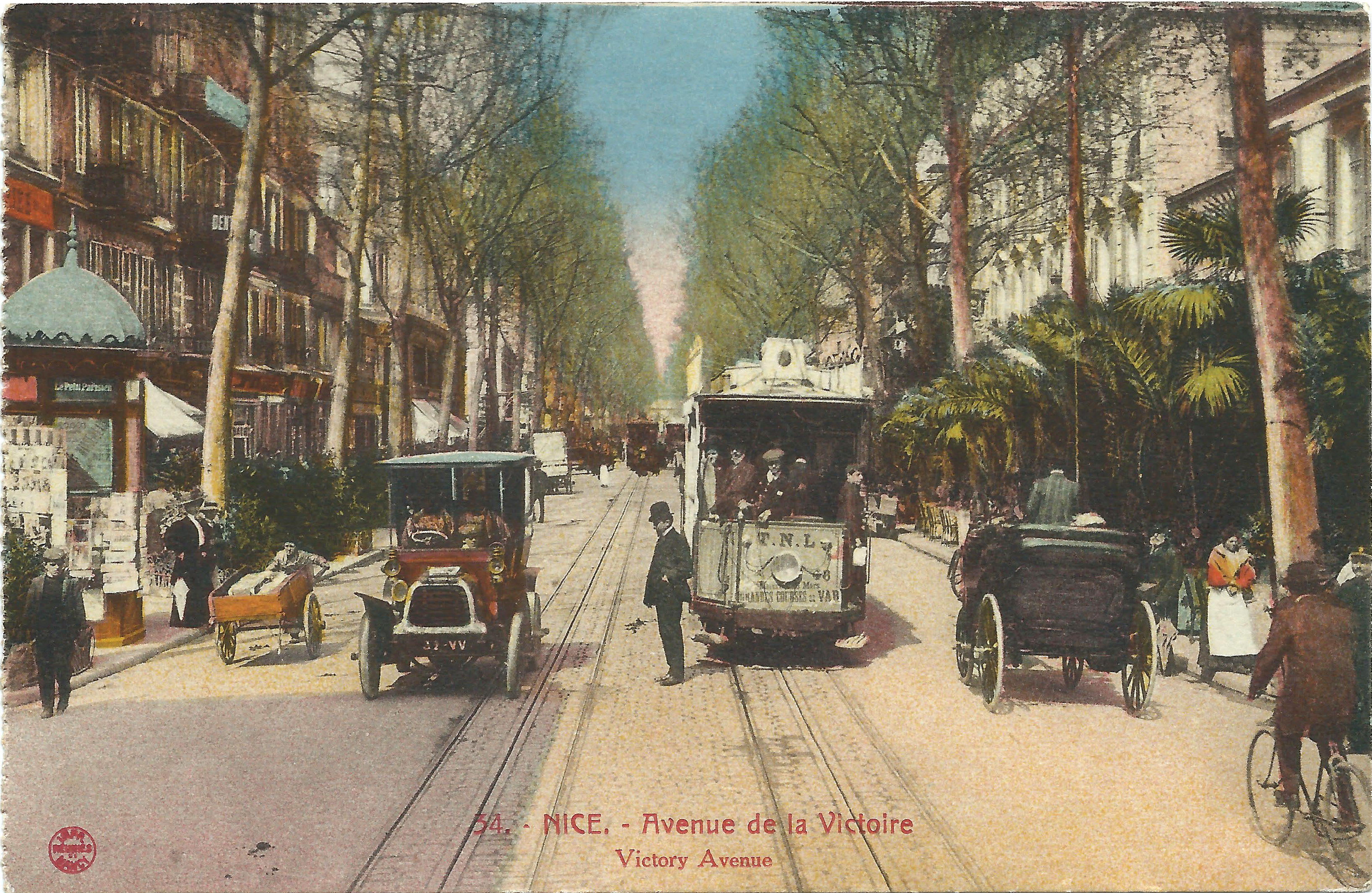 De Avenue de la Victiore in Nice